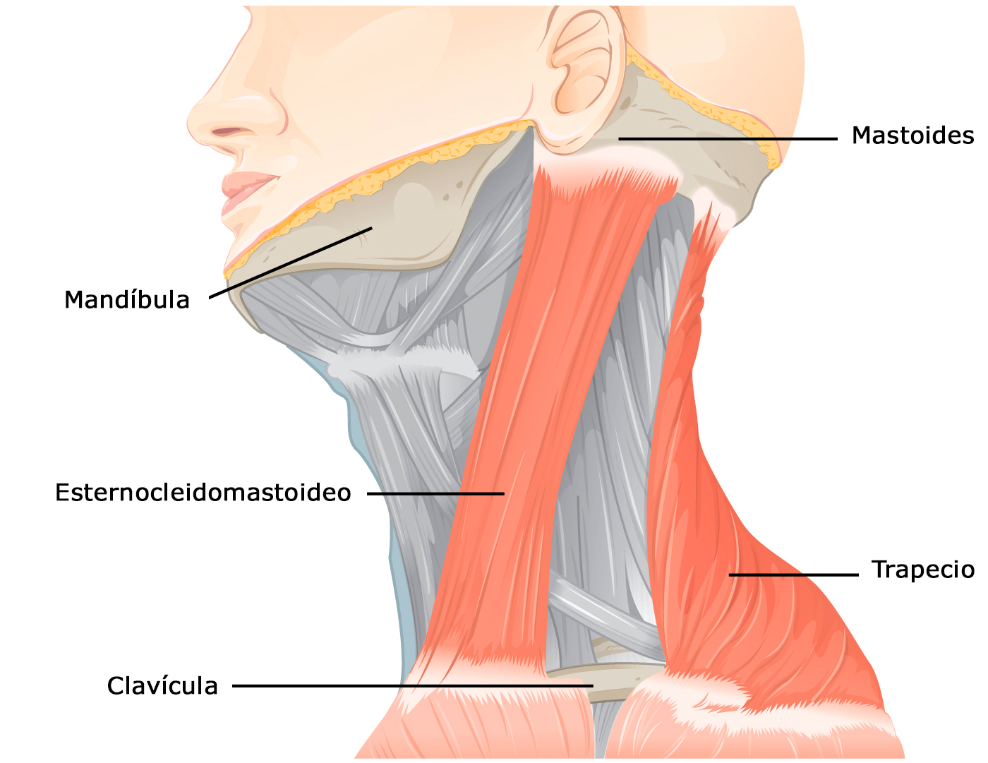 Ilustración anatómica en la que se representa el músculo esternocleidomastoideo y sus inserciones